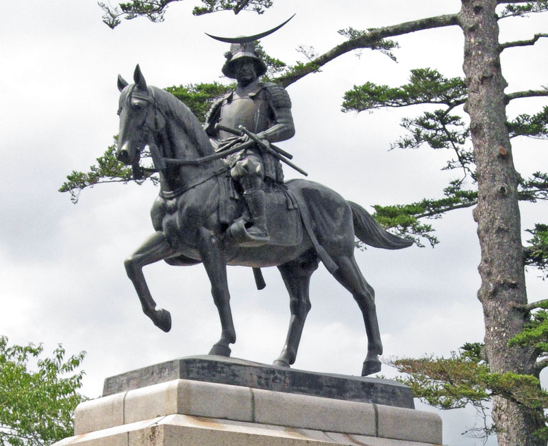 SendaiCastle01.jpg